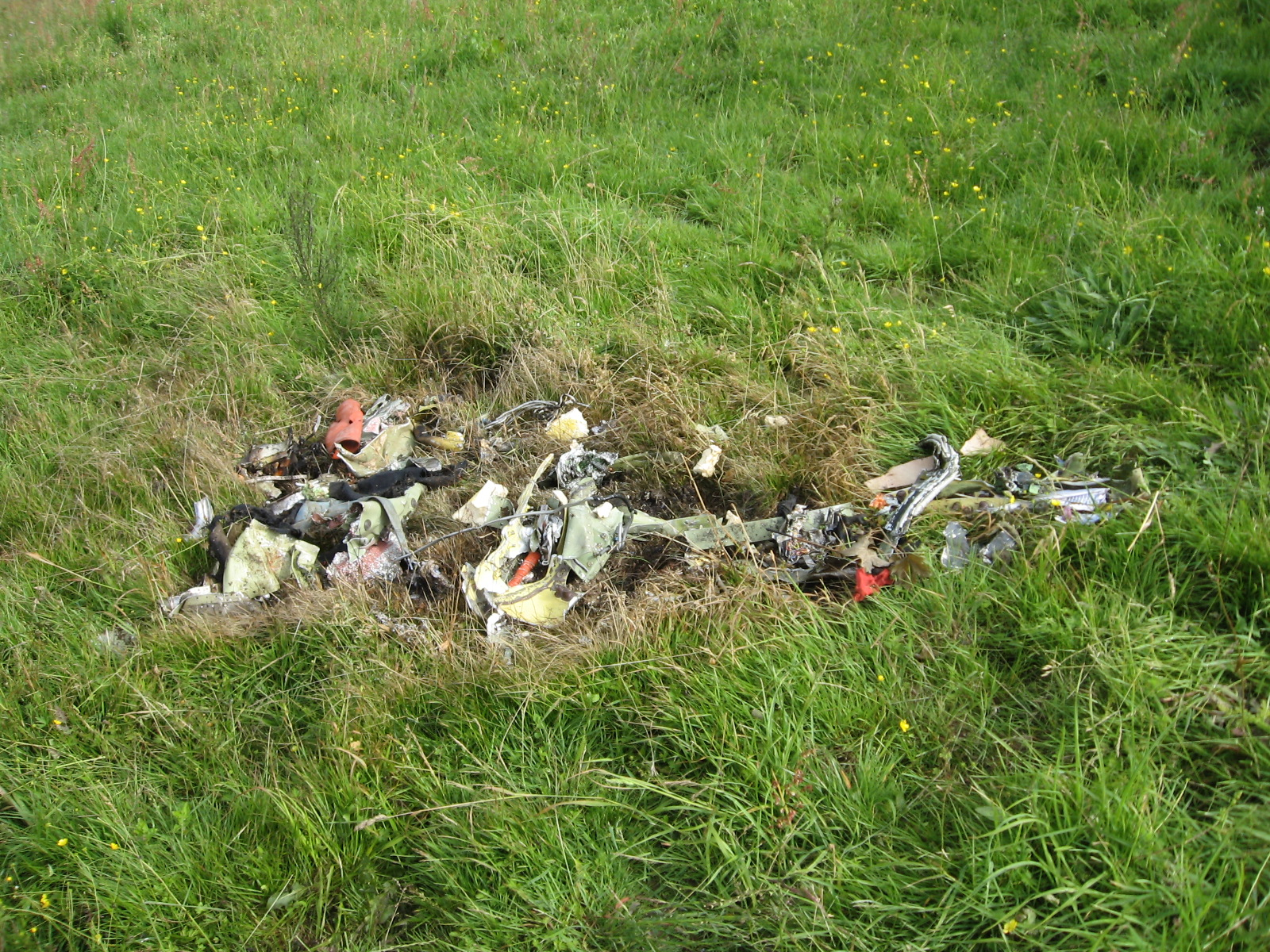 Trümmer des Learjet 35 Absturzes östlich Olberg-Elpe